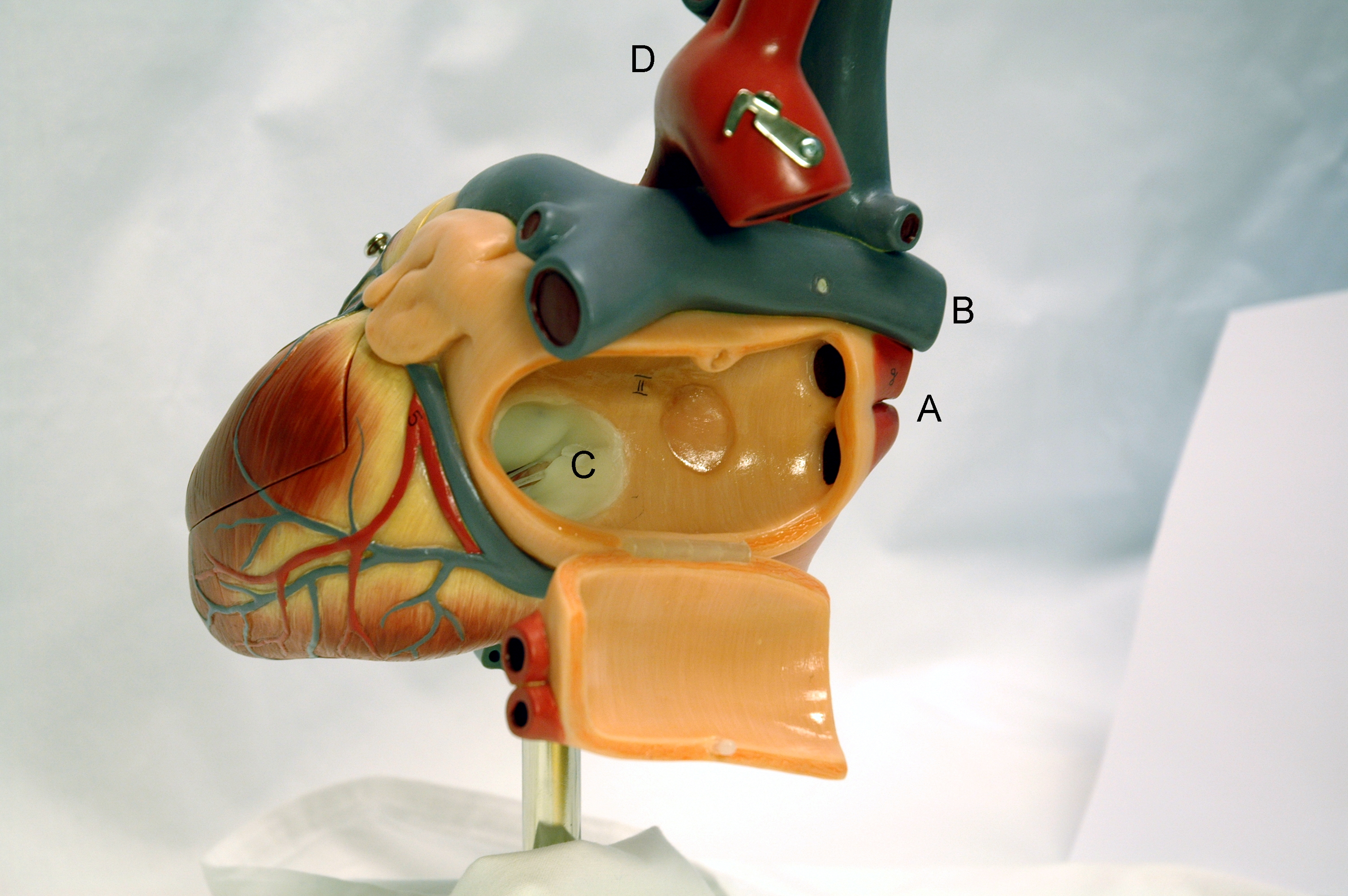 Fotografi av ein hjartemodell. Biletet er teke bakfra og visar A. lungevener, venstre forkammer, fossa ovalis og C. mitralklaffen. Over hjarte kan ein sjå B. lungepulsåra i blått og D. aorta i raudt.